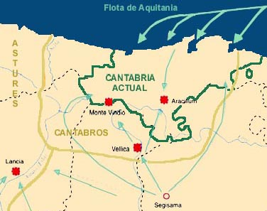 zona de astures y romanos en la conquista de hispania